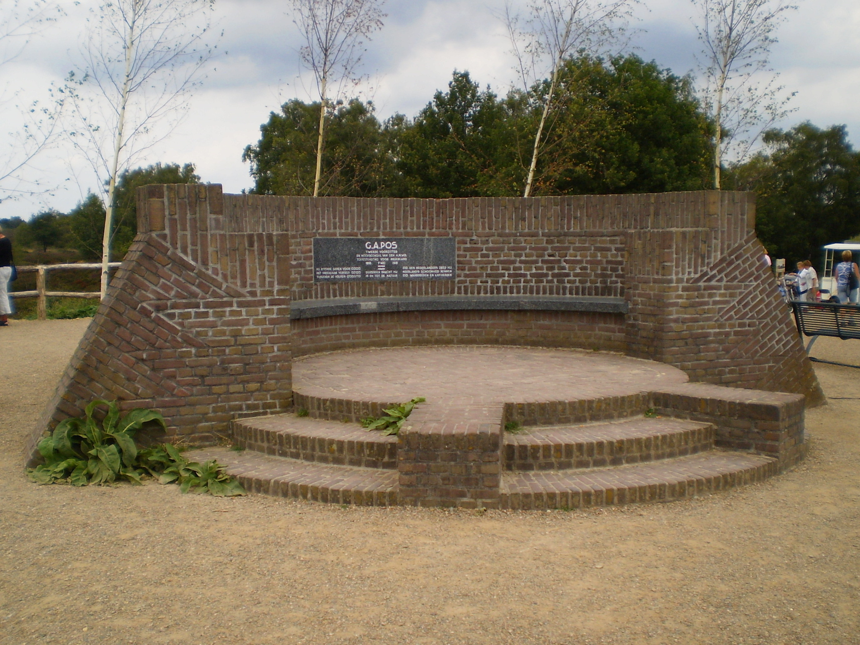 Posbank, Herikhuizerveld, Gelderland, NL